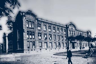 Edificio de la escuela de enseñanza técnica " Otto Krause"